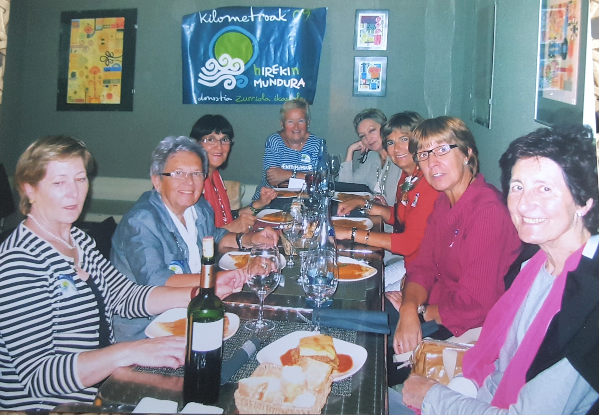 2009ko Kilometroak jaia zela eta, hasierako andereñoen bilera